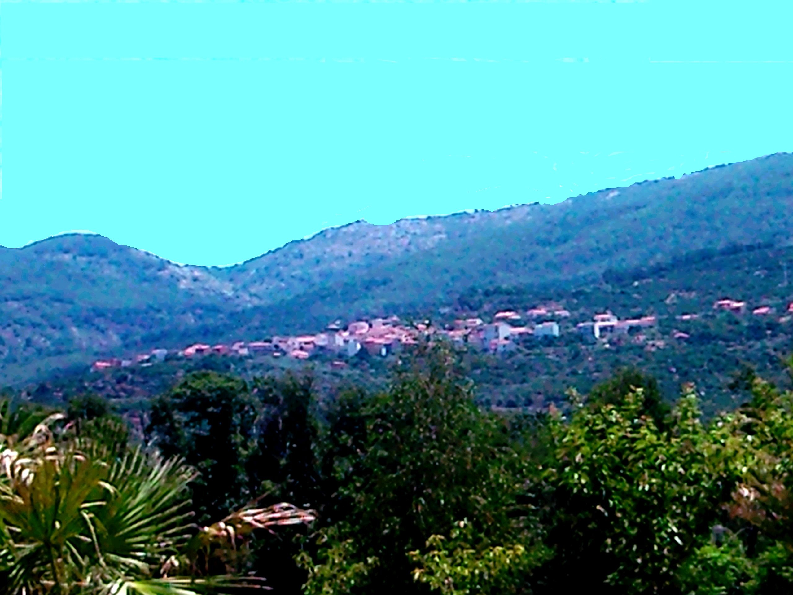 Panorámica de Valdastillas